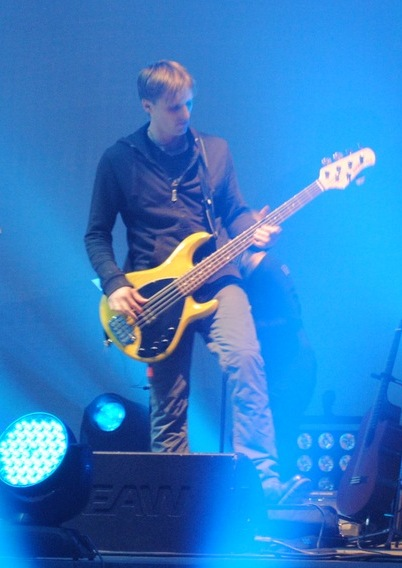 концерт ДДТ в Воронеже 26.10.2011 г.